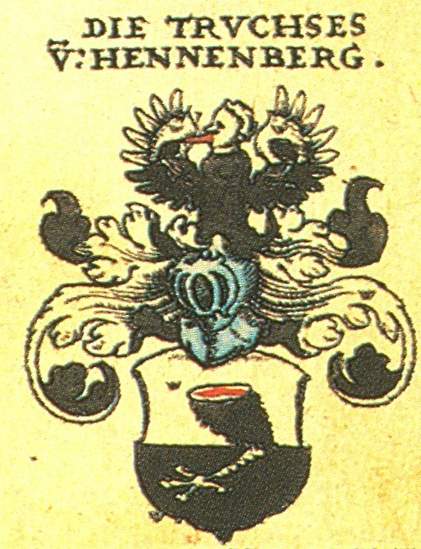 Ritterschaft und Adel in Franken Wappen der Familie Truchseß von Henneberg.